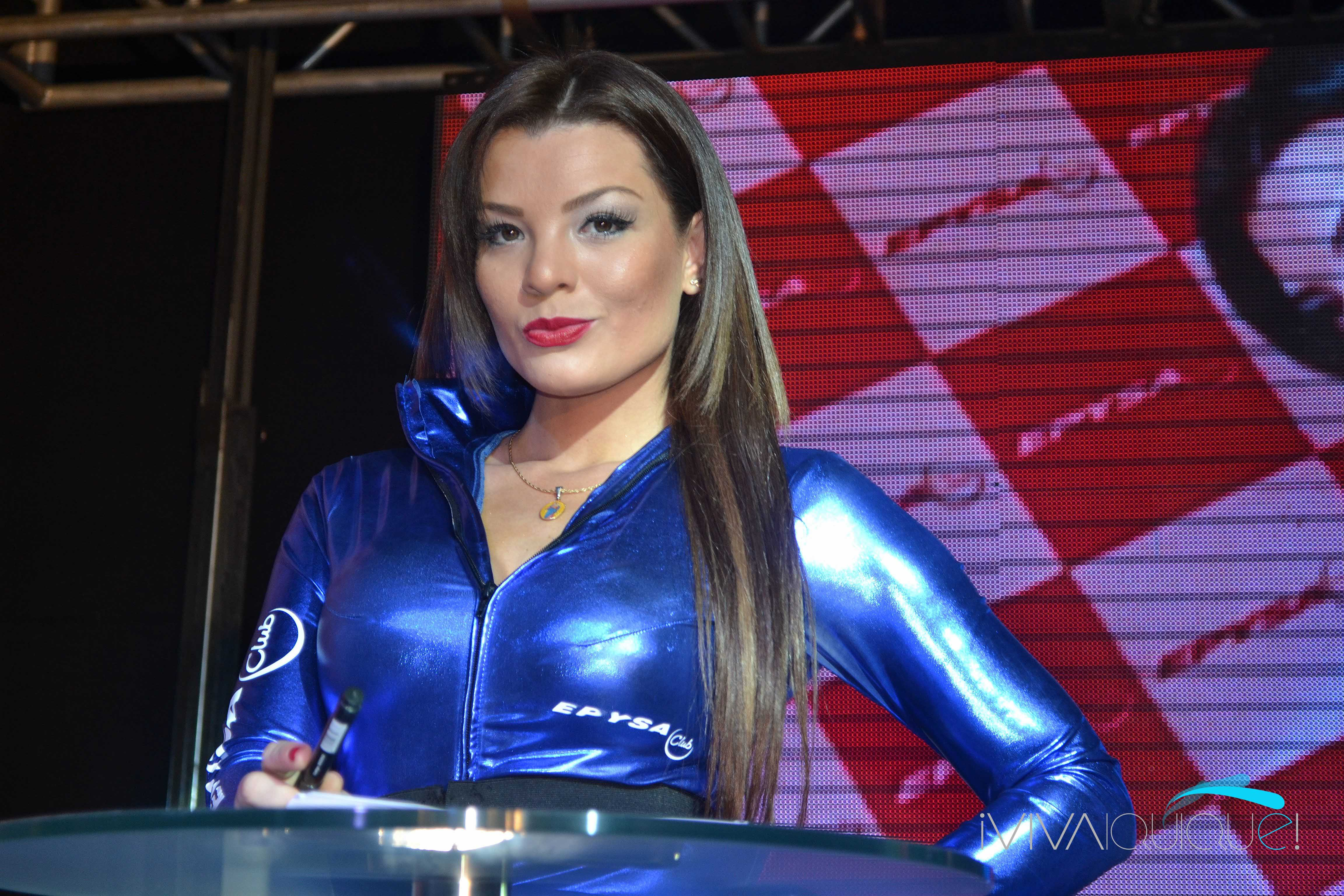 Fotografías: Gabriel Muñoz Ubal.